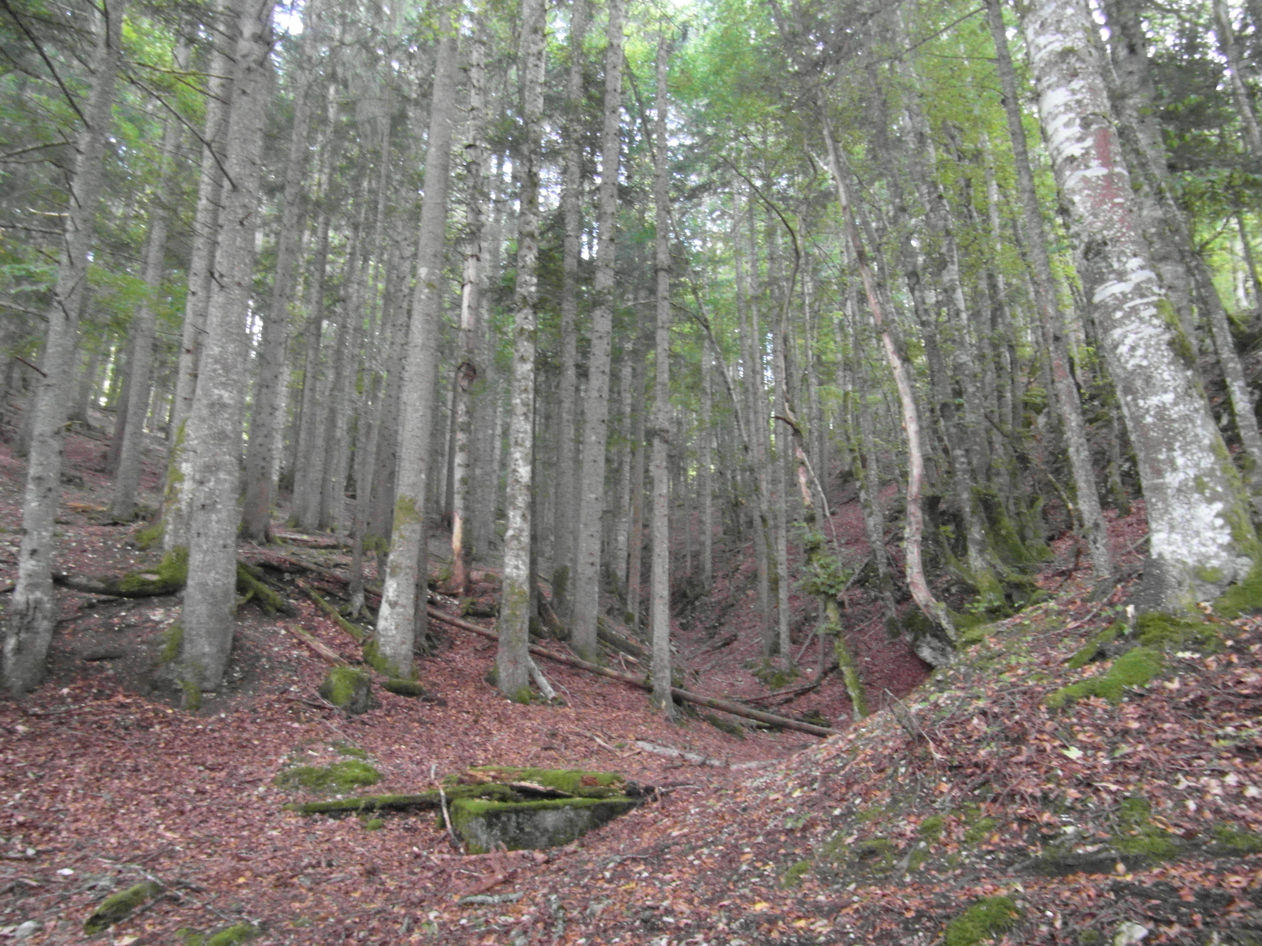 Vallon de l'oeil de la Duis (source du font noire)